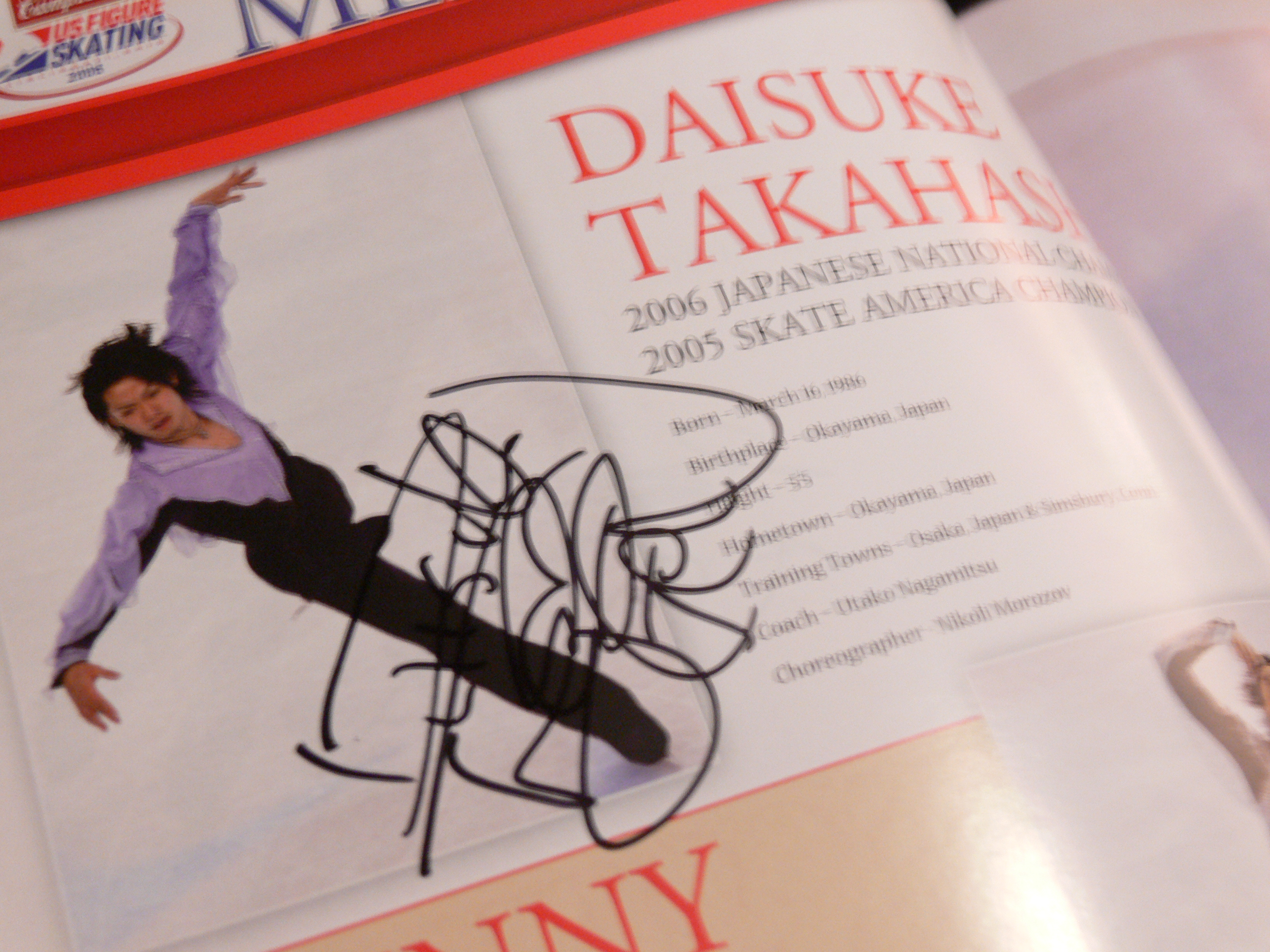 Daisuke Takahashi